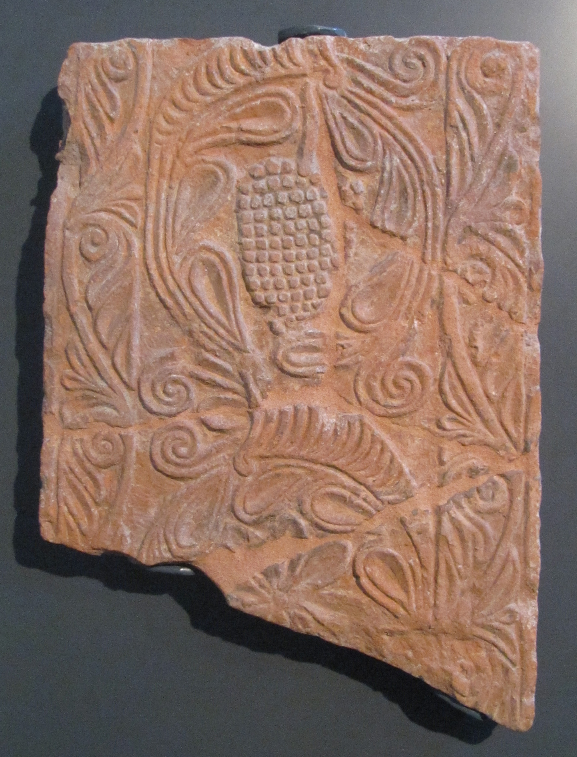 Terracotte architettoniche di San Salvatore, VIII secolo, museo di Santa Giulia, Brescia